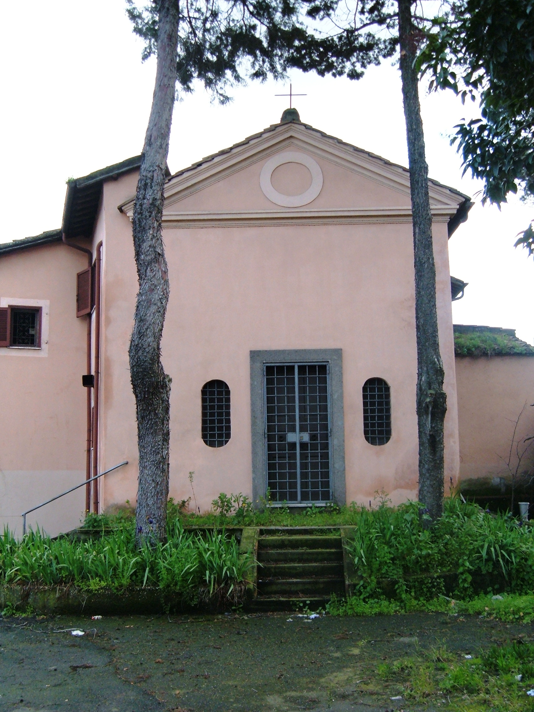 Chiesa di San Giovanni Battista nella zona Z.XVIII Capannelle(località Osteria del Curato).